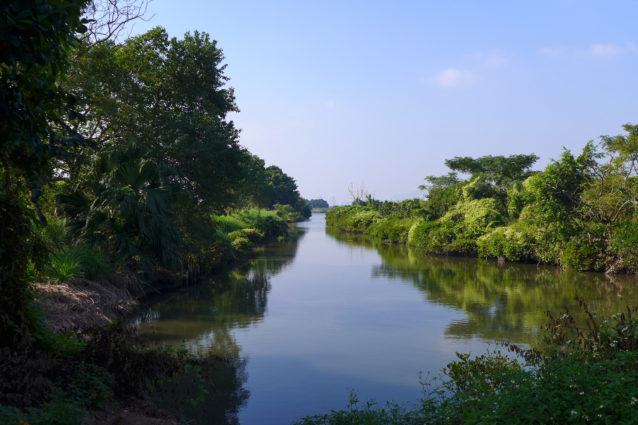 Mai Po Marshes Gei wai